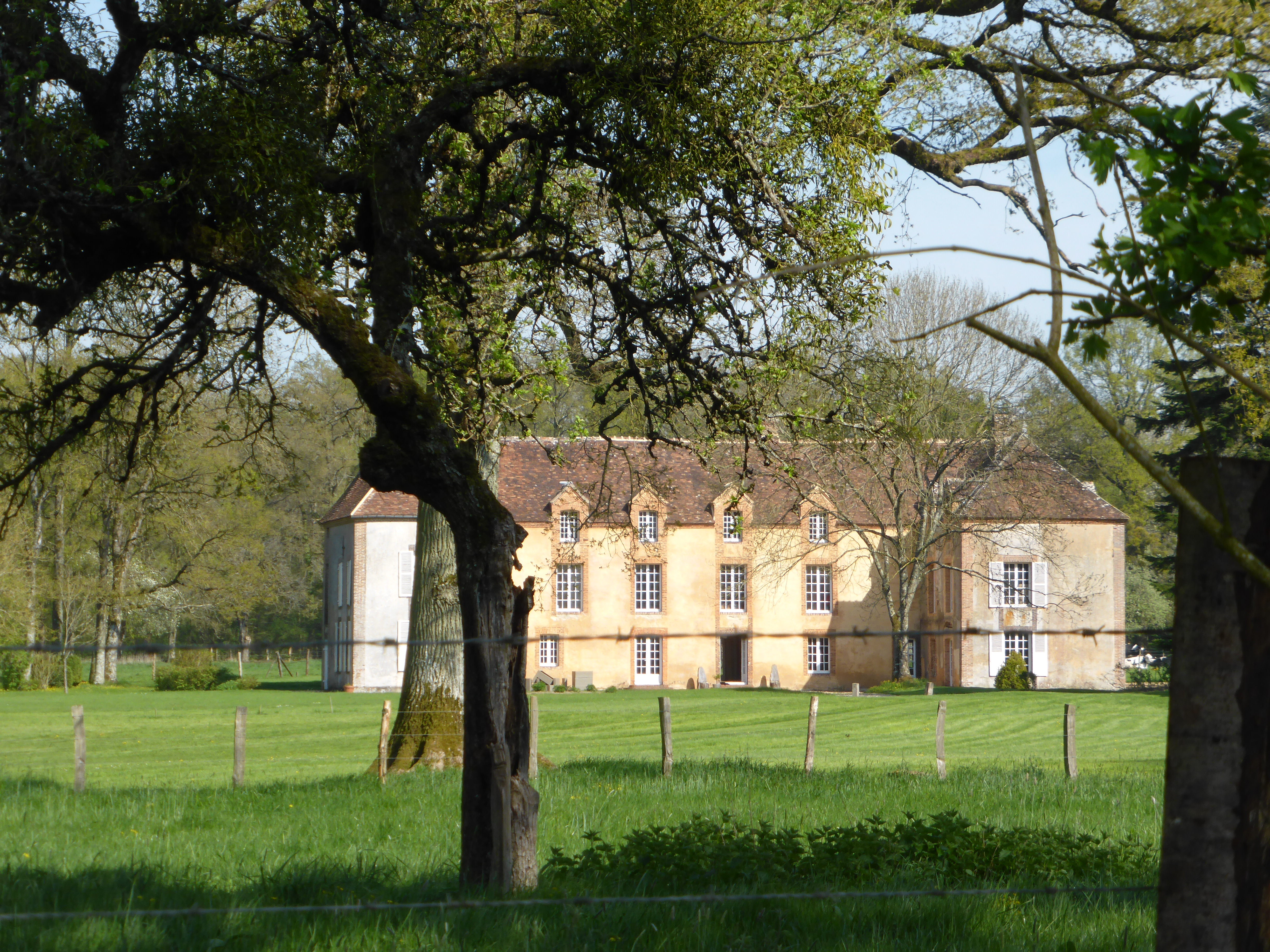 Château de Montireau, dit la Cour d'Anthenaise, en Eure-et-Loir.